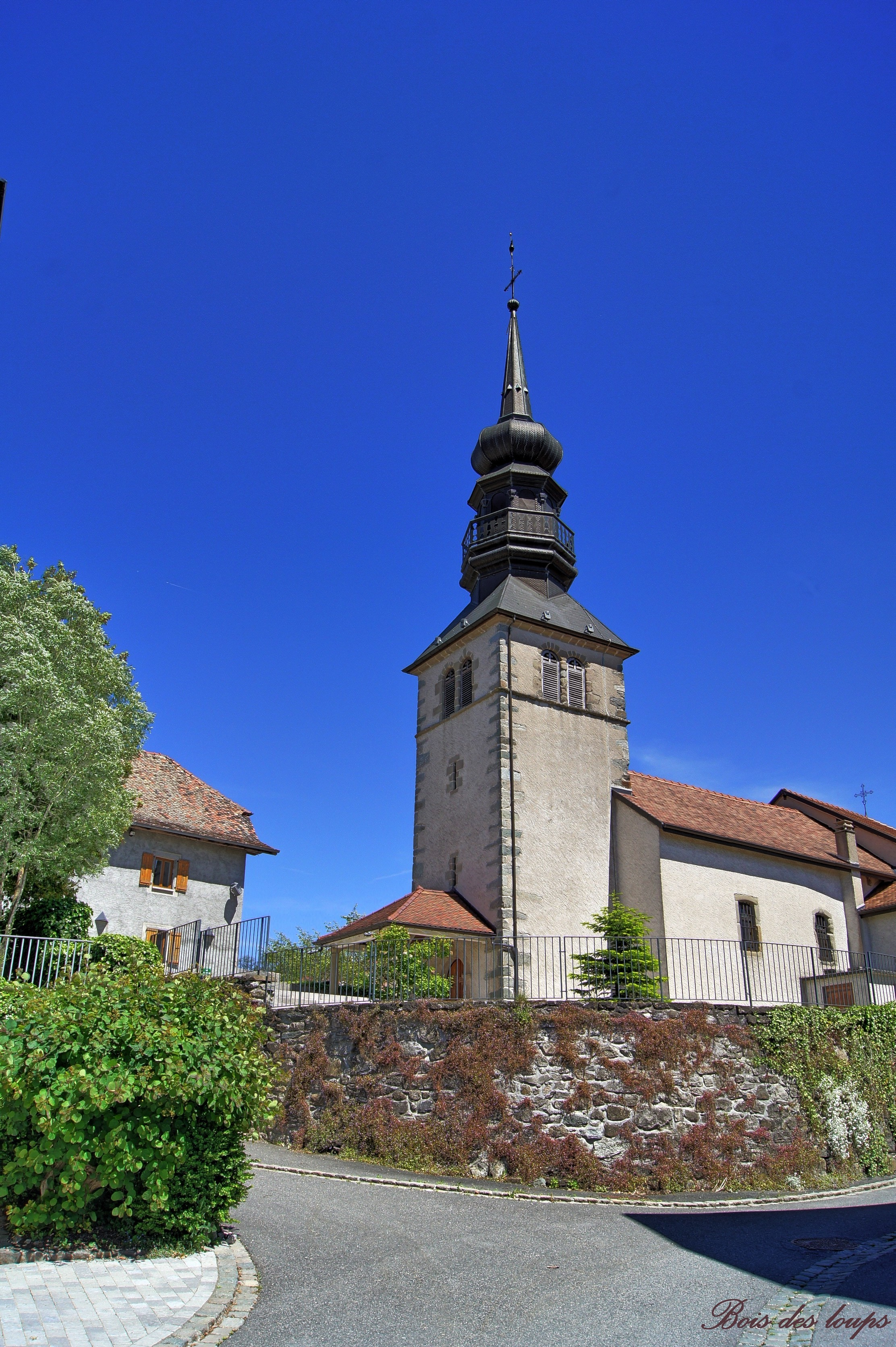 24 mai 2014